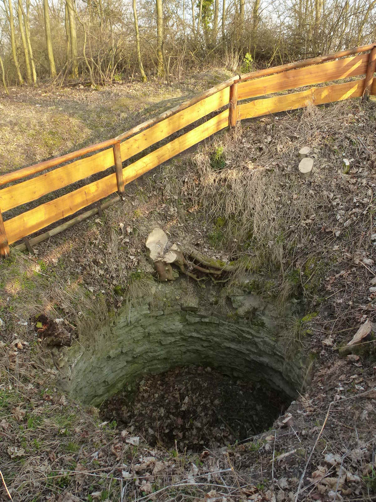 каменная цистерна, сохранившаяся от крепости "старый Кирхберг" на горе Хаусберг у Йены